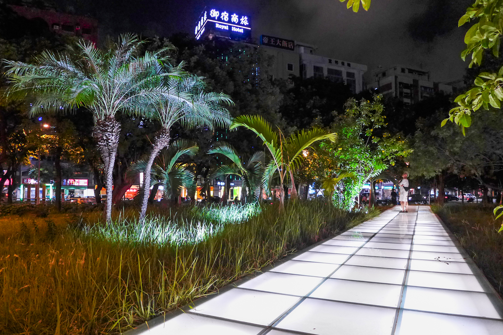 Kaohsiung Urban Spotlight